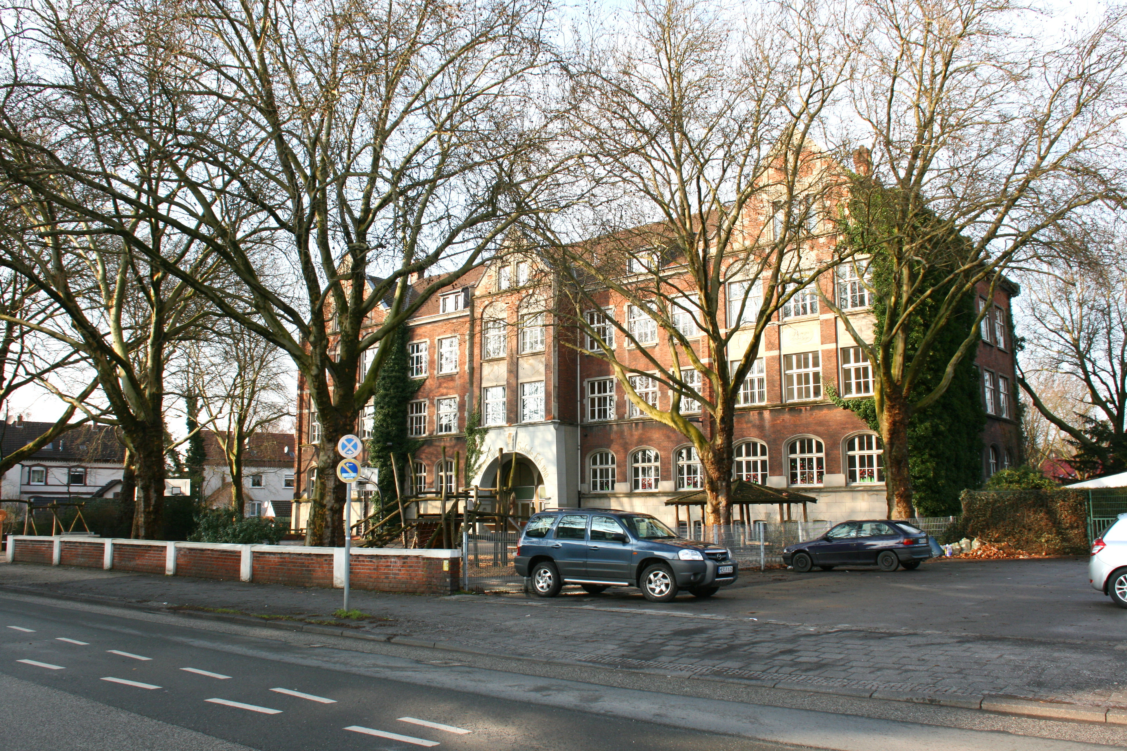 Königin-Luisen-Schule (Städt. Gemeinschaftshauptschule), Wilhelmstraße 88 in Herne